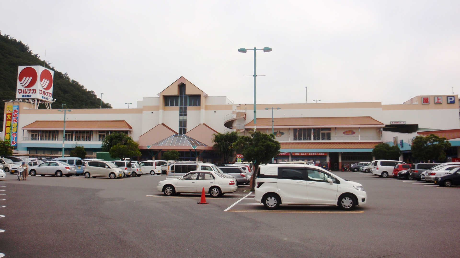 香川県高松市にあるマルナカ栗林南店。